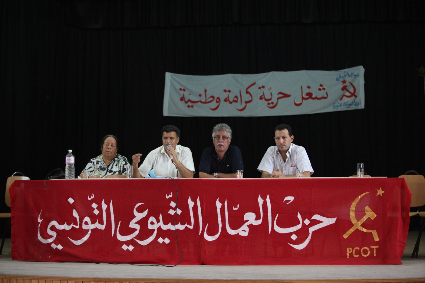 Réunion du Parti communiste des ouvriers de Tunisie à Jemmal